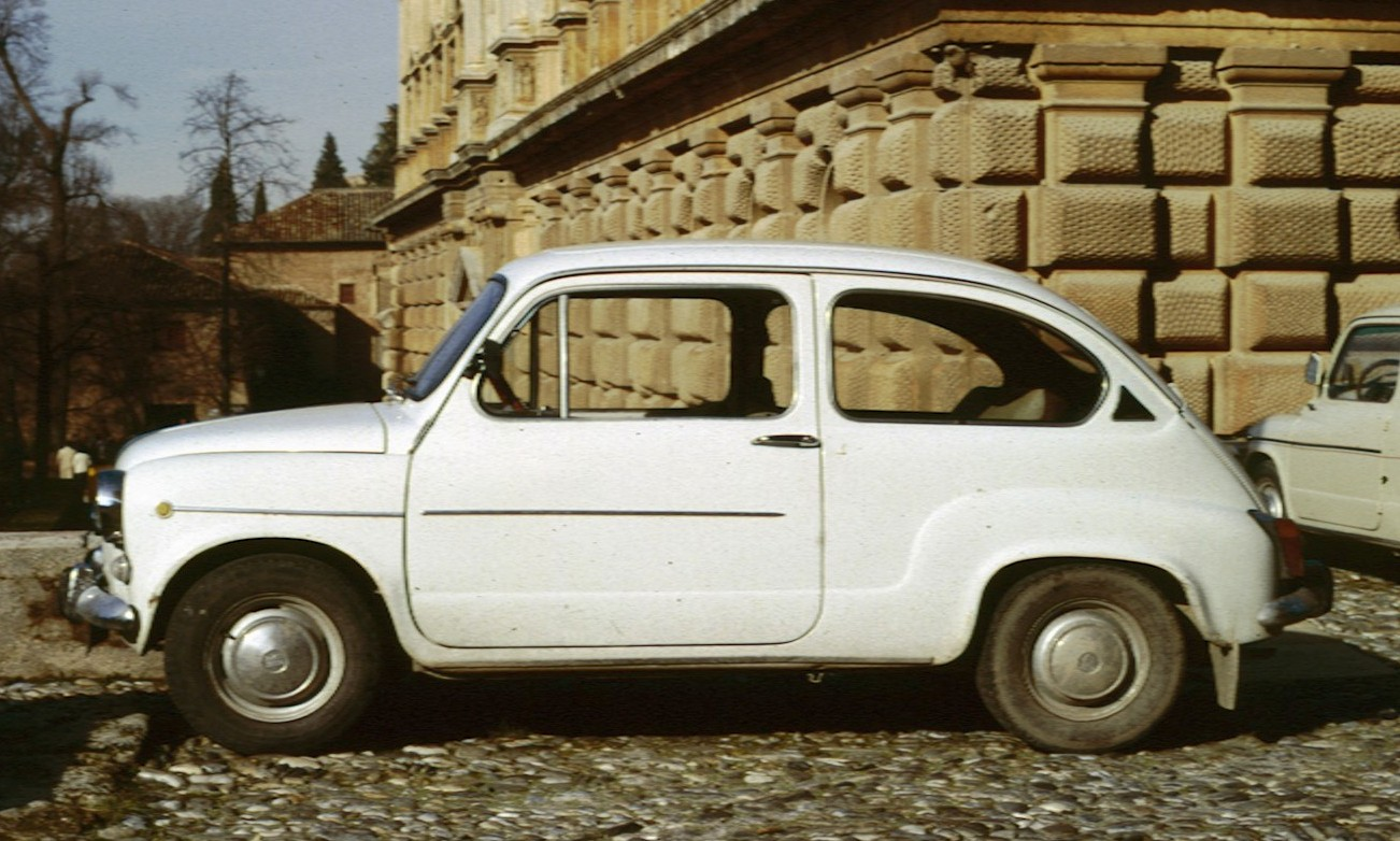 Seat 600 in Andalusia